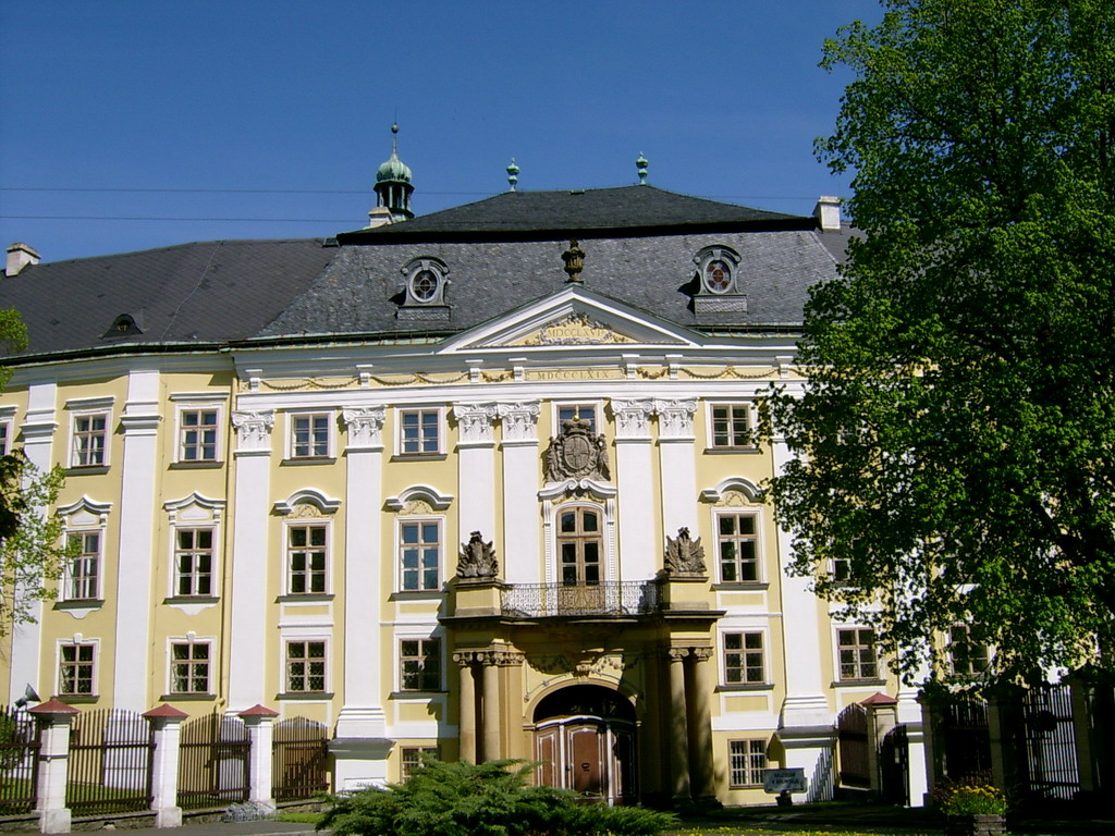 Zámek Bruntál, vstup.